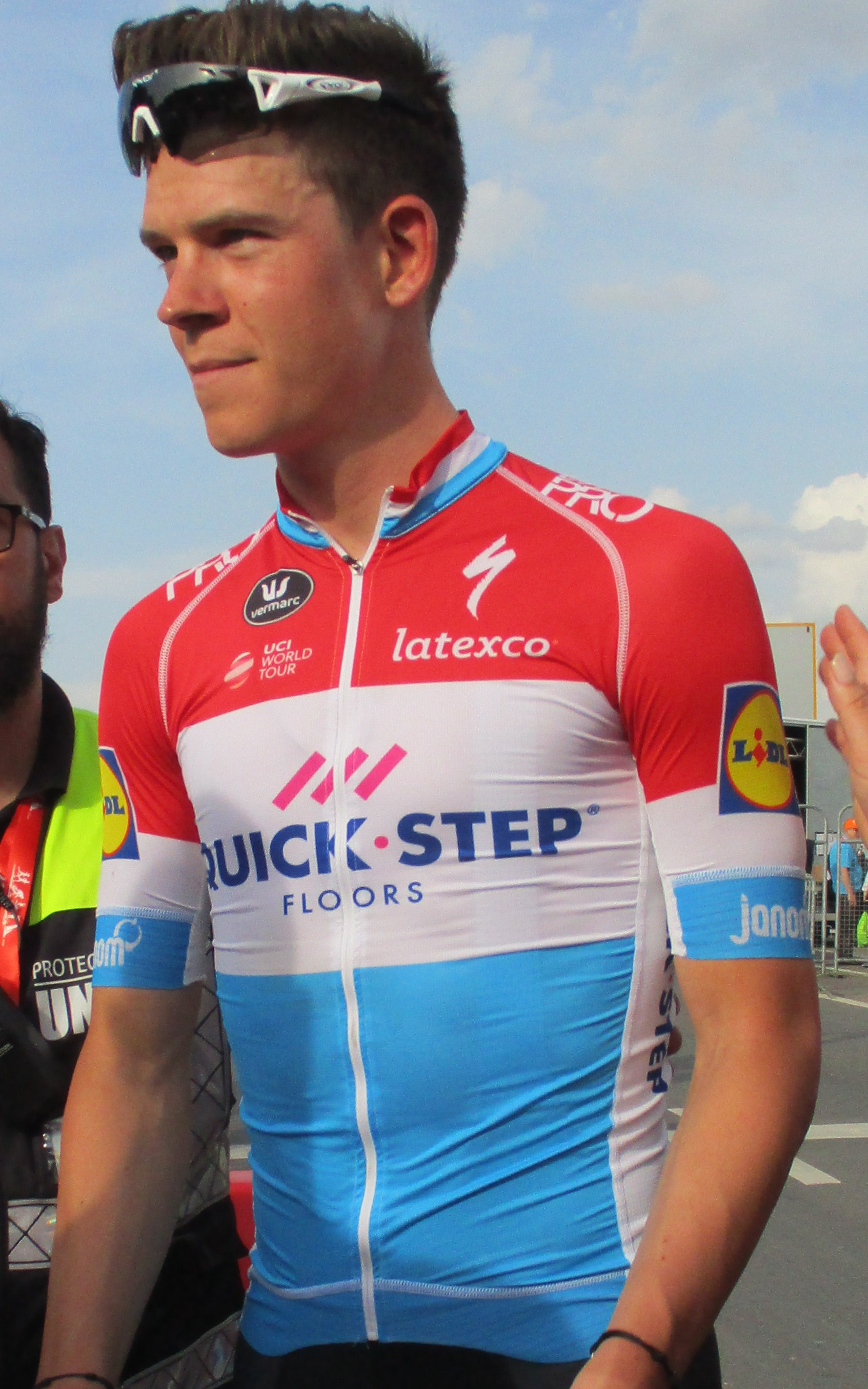 Finish van Luik-Bastenaken-Luik 2018 in Ans.